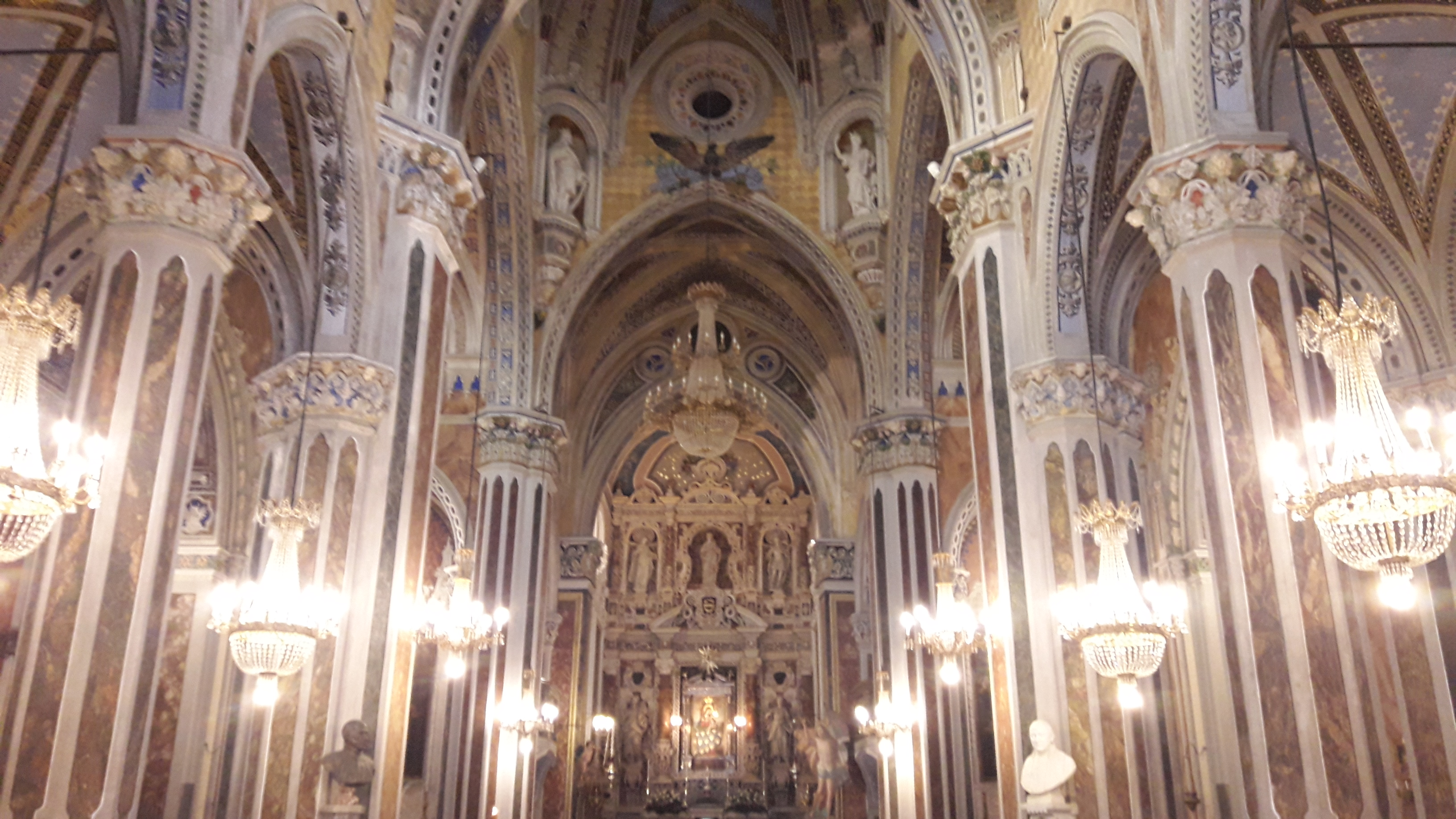 Interno della Chiesa madre di Custonaci, Sicily